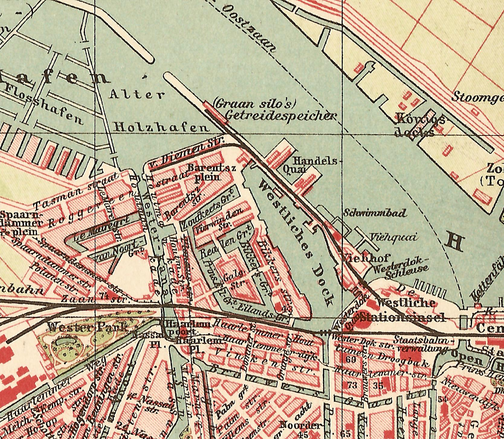 Fragment van kaart Amsterdam uit Brockhaus Konversations Lexikon 1901 Erster Band 'A - Athelm' Dit materiaal is in het publiek domein omdat het auteursrecht op dit materiaal is verlopen (de auteur is meer dan 70 jaar geleden overleden of het auteursrecht ligt bij een niet-natuurlijk persoon en het materiaal is meer dan 70 jaar geleden gepubliceerd). Het meer dan 100 jaar oude, in mijn bezit zijnde, boek bevat geen copyright aanduidingen. Spiritofdeaddog 9 dec 2007 17:36 (CET)